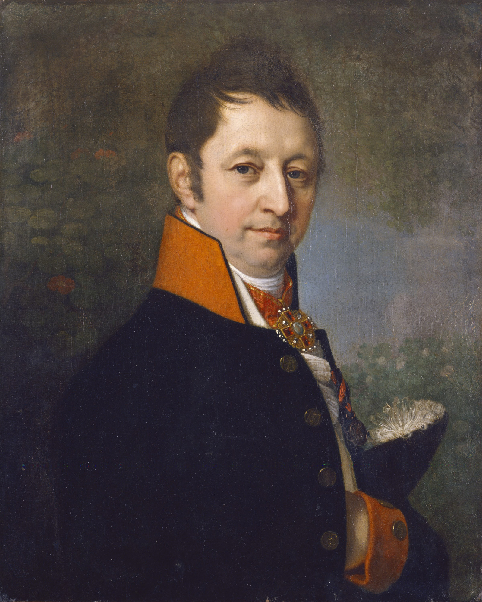 Иван Михайлович Яковлев (1763-1832), внук известного купца-миллионера Саввы Яковлевича Яковлева (1712-1784); сын М.С.Яковлева (1742-1781) и Степаниды Степановны Яковлевой (1738-1781). С 1809 г. – коллежский советник при Почтовом правлении, промышленник. Владелец большой мануфактуры в Ярославле.